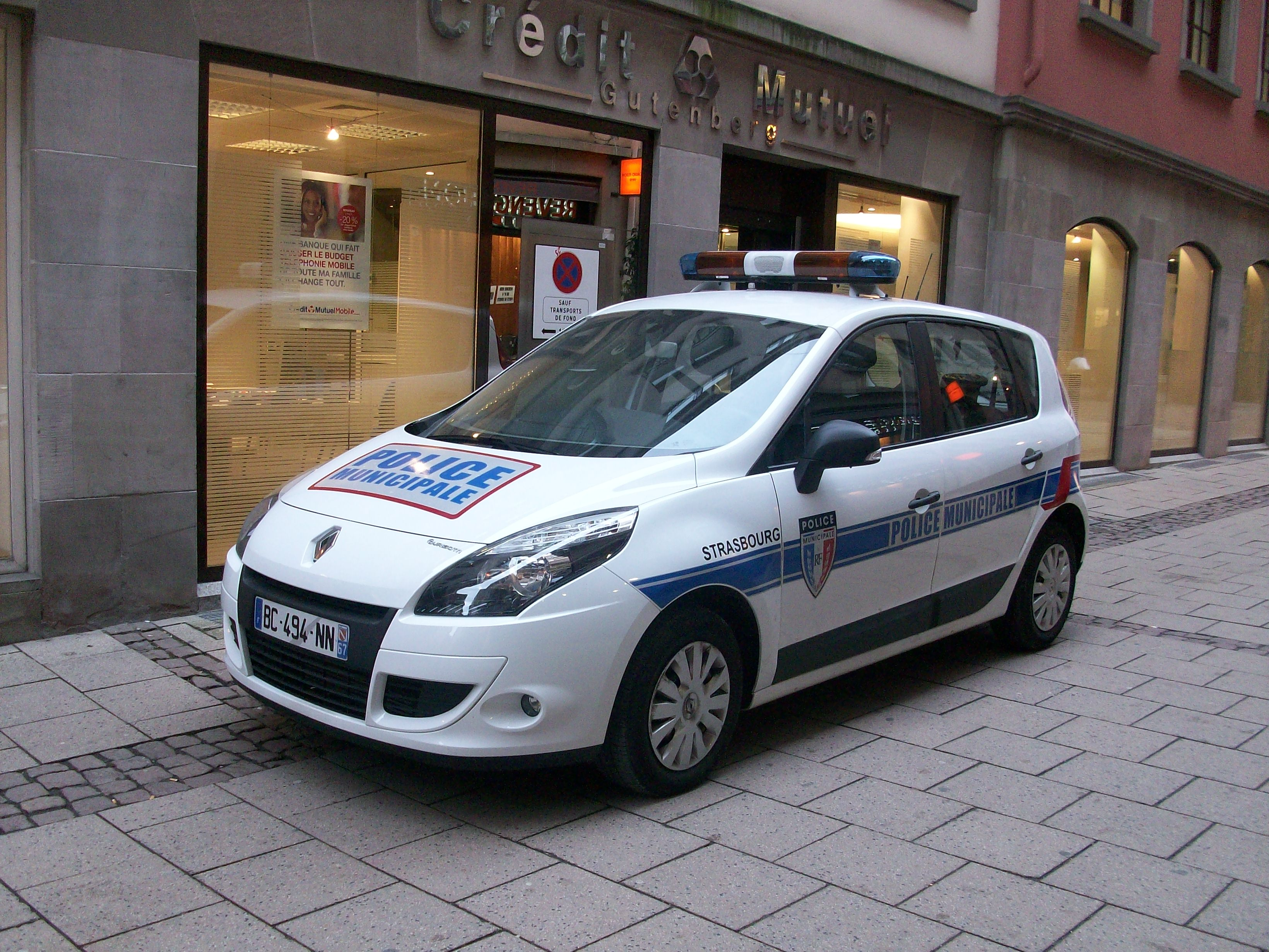 Scénic de la police municipale de strasbourg